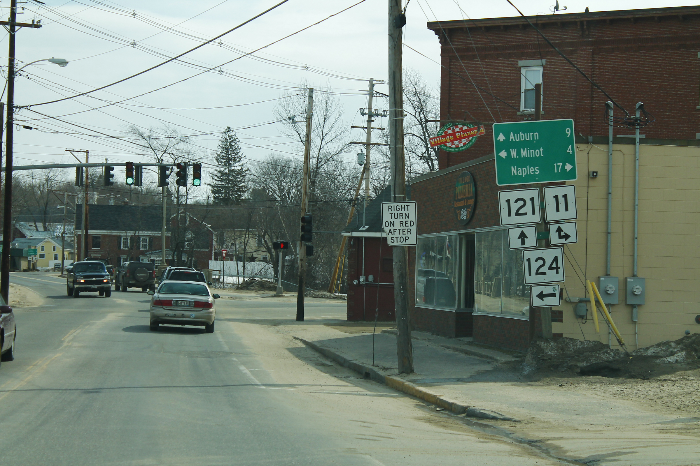 ME121nME11nsME124leftSigns_